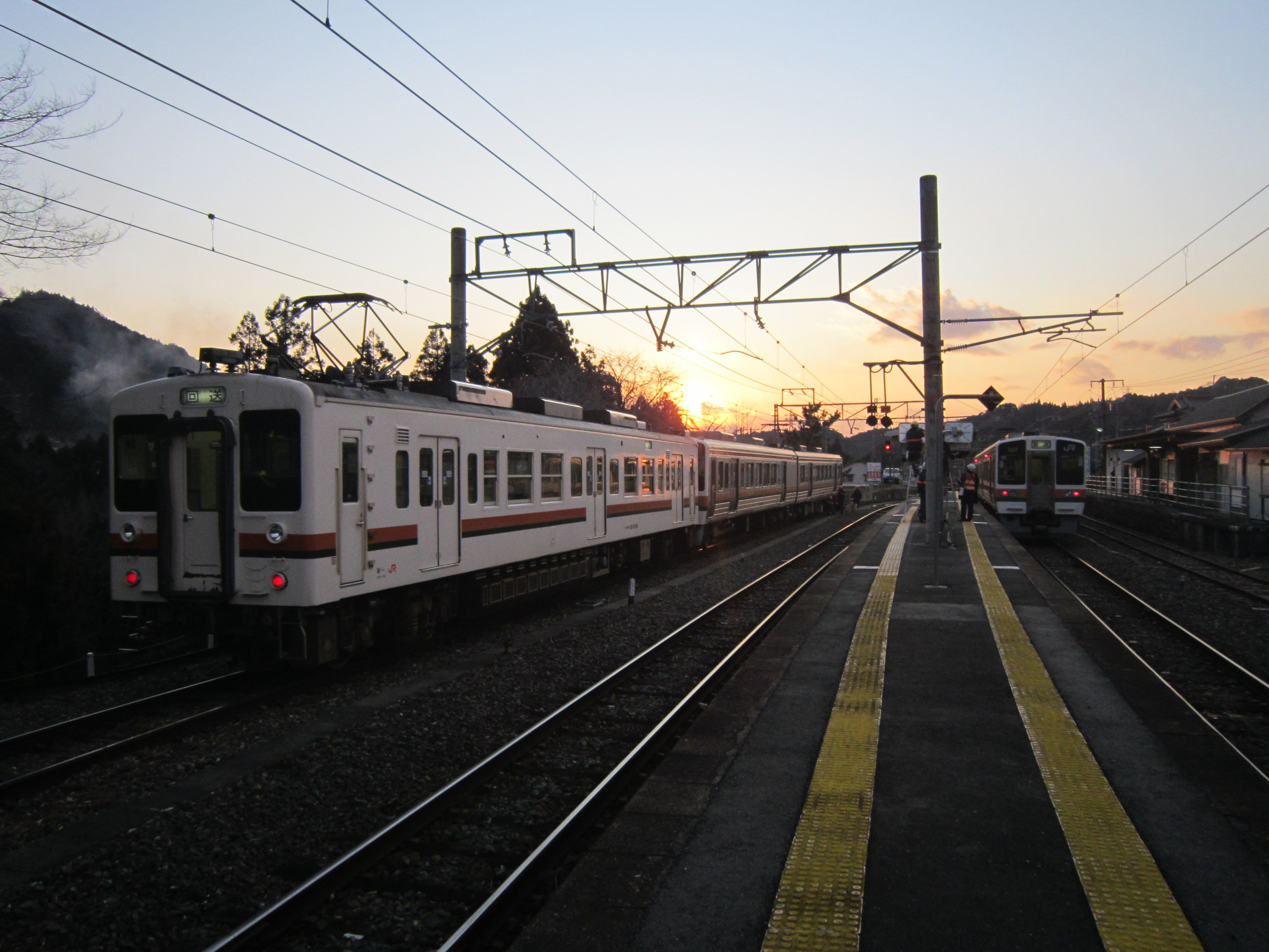 ご使用はご自由にどうぞ